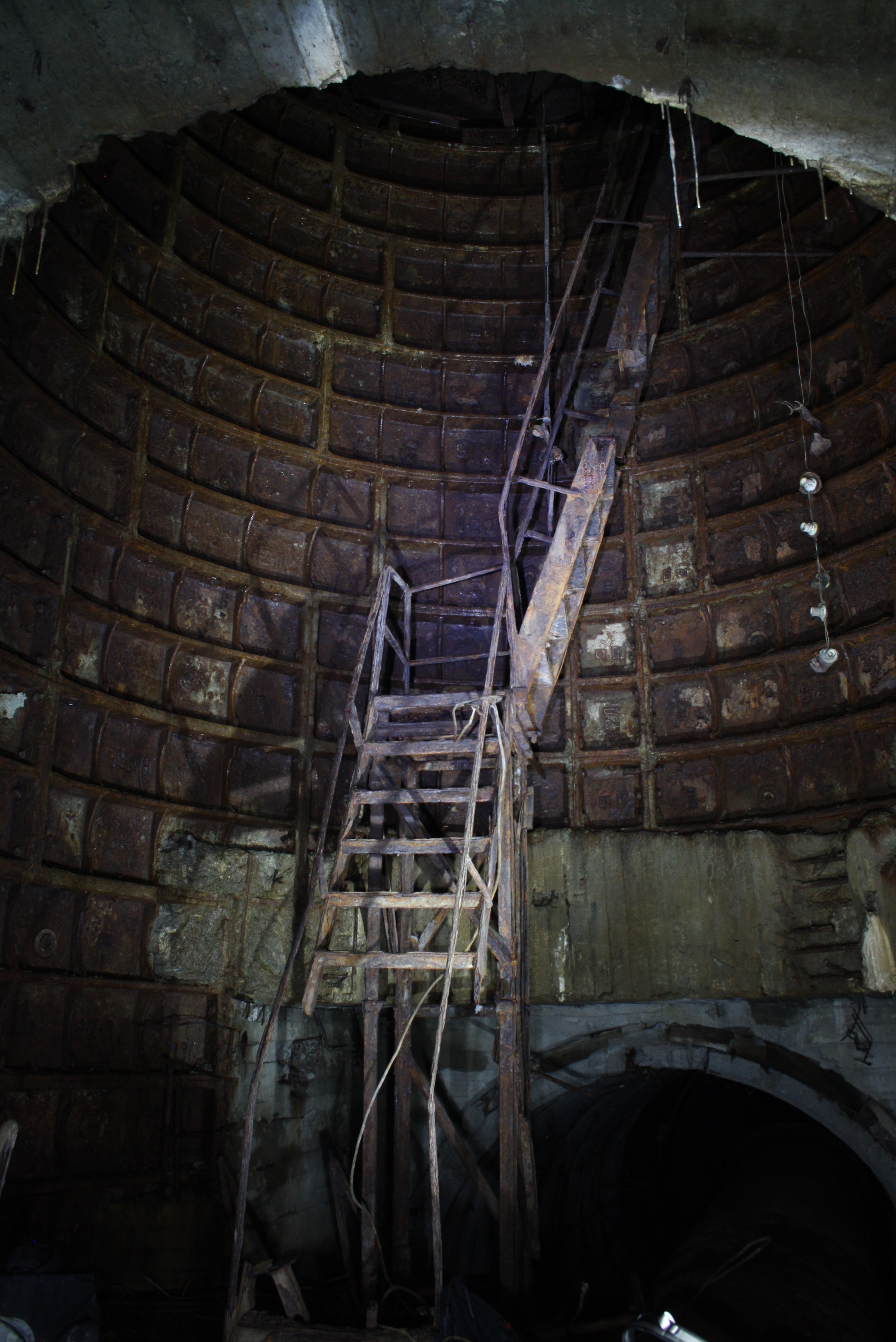 Tübbingausbau einer Schachtröhre